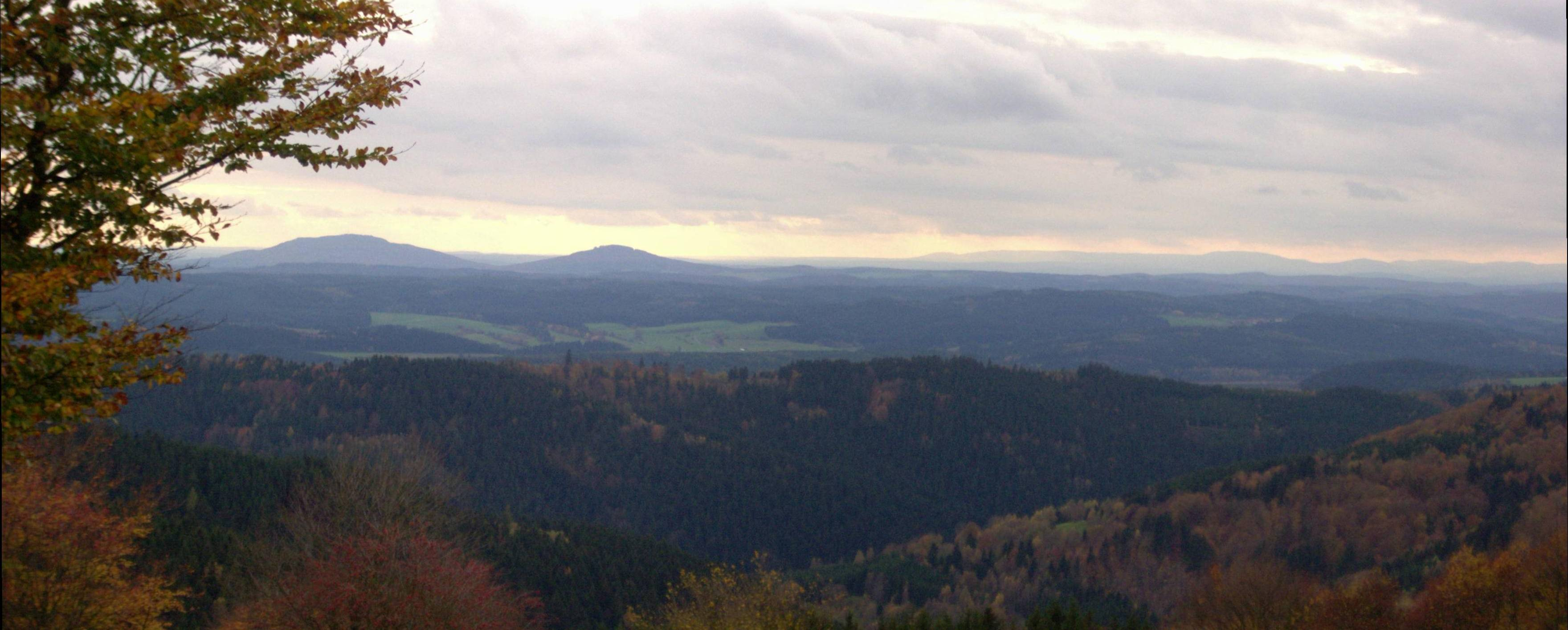 Blick vom Simmersberg (781 m) im Thüringer Schiefergebirge auf die 24 km entfernten Gleichberge (679 und 641 m). Rechts im Hintergrund die Hohe Rhön mit dem 67 km entfernten, 928 m hohen Kreuzberg, unmittelbar davor (halbrechts mittig) der 7 km entfernte Ratscher Bergsee. Im Vordergrund der 621 m hohe, nur 3 km entfernte Wachberg